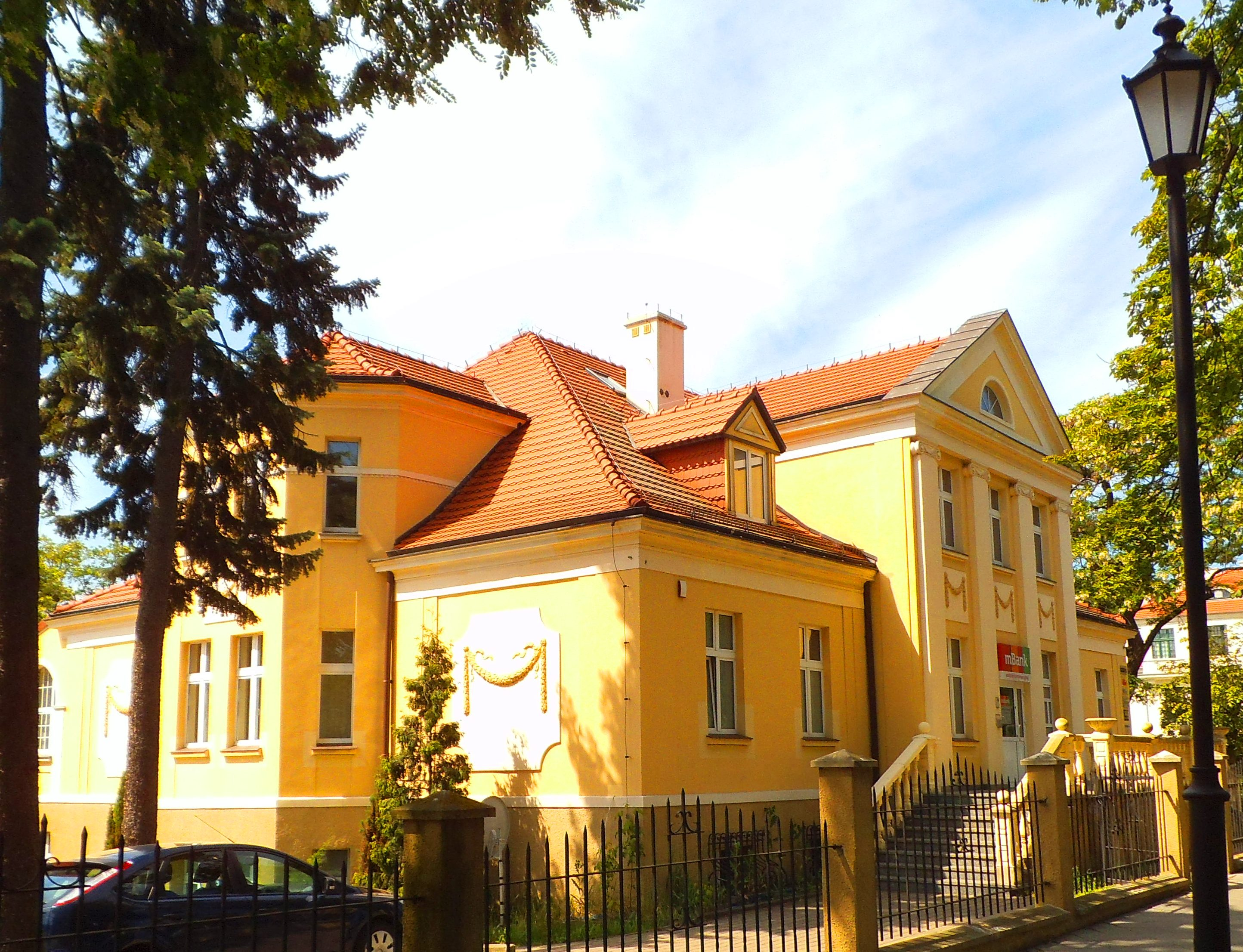 Budynek przy ul. Bydgoskiej 1,3 w Toruniu